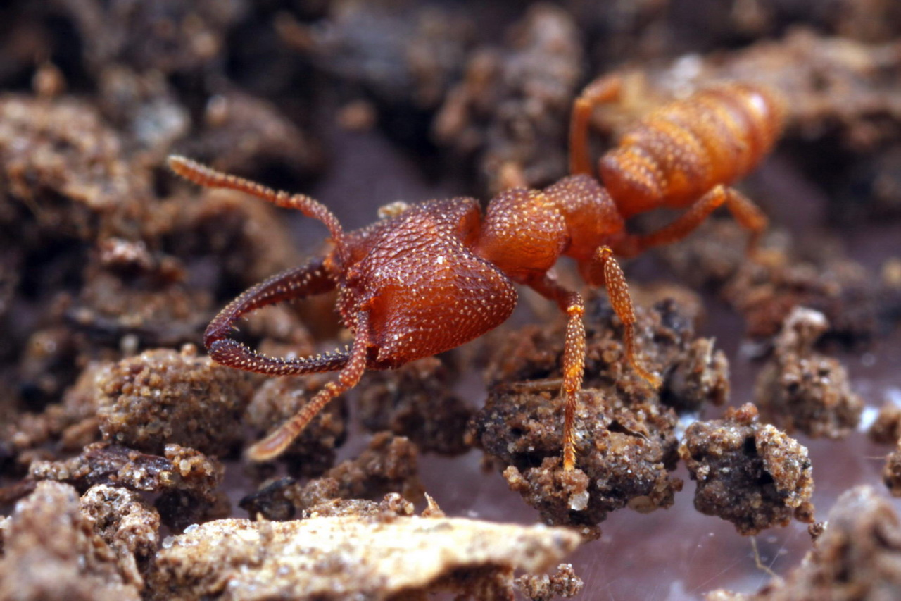 Shattuck_53306, Mystrium, Danum Valley, Sabah-web